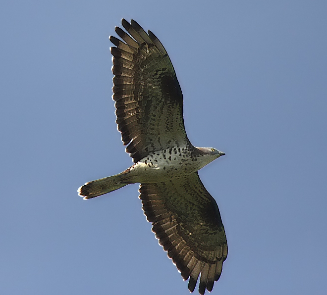 Wespenbussard (Pernis apivorus) helle Morphe im Flug